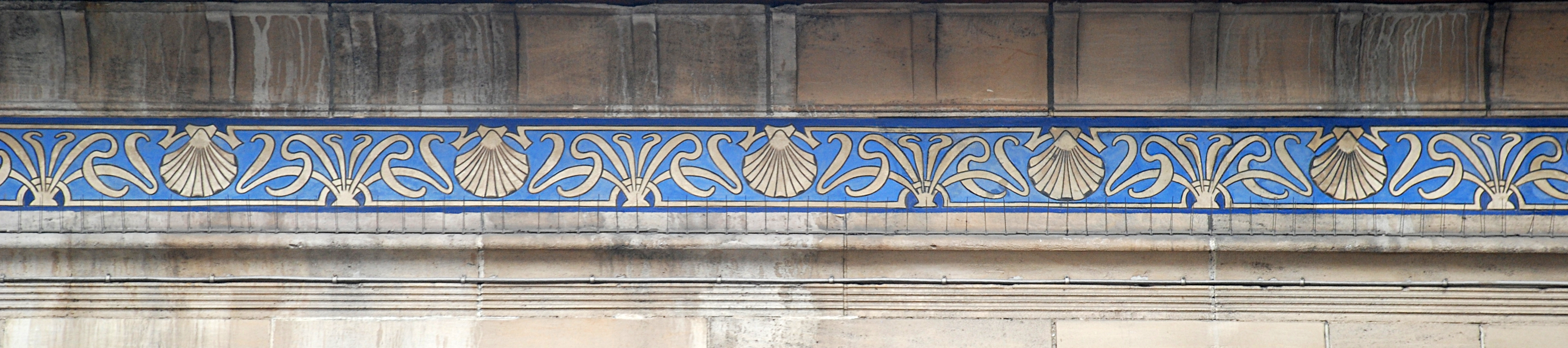 Belgique - Bruxelles - Hôtel Otlet